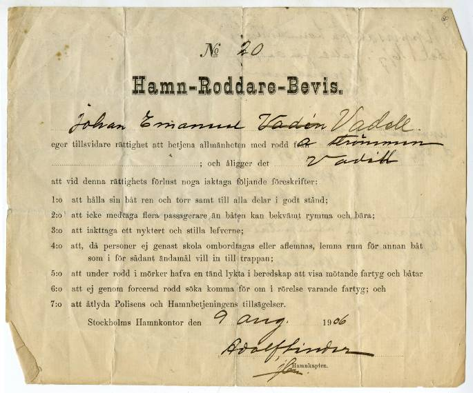 Hamnroddbevis för Stockholm från 1906